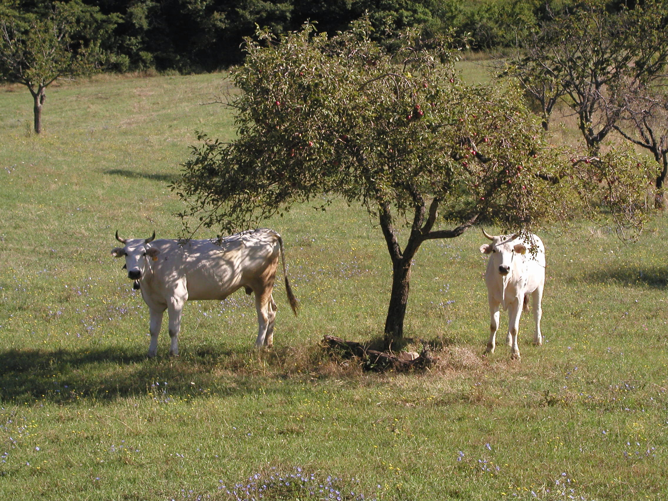 Chianina Kühe in der Toskana